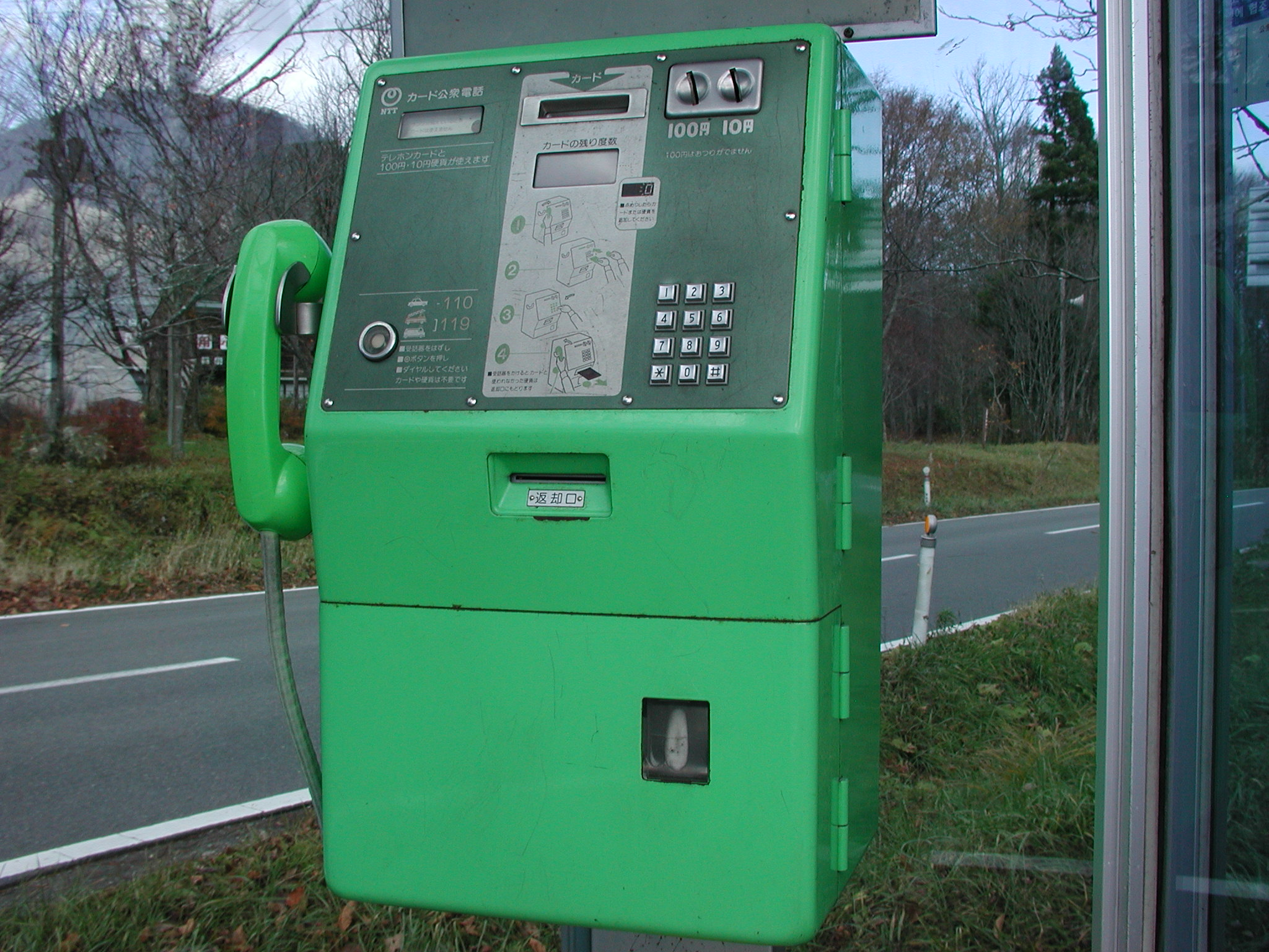 日本電信電話（NTT） MC-1PN型公衆電話機青森県三戸郡新郷村迷ヶ平にて（残念ながら、同区間では冬季閉鎖区間内となっている）